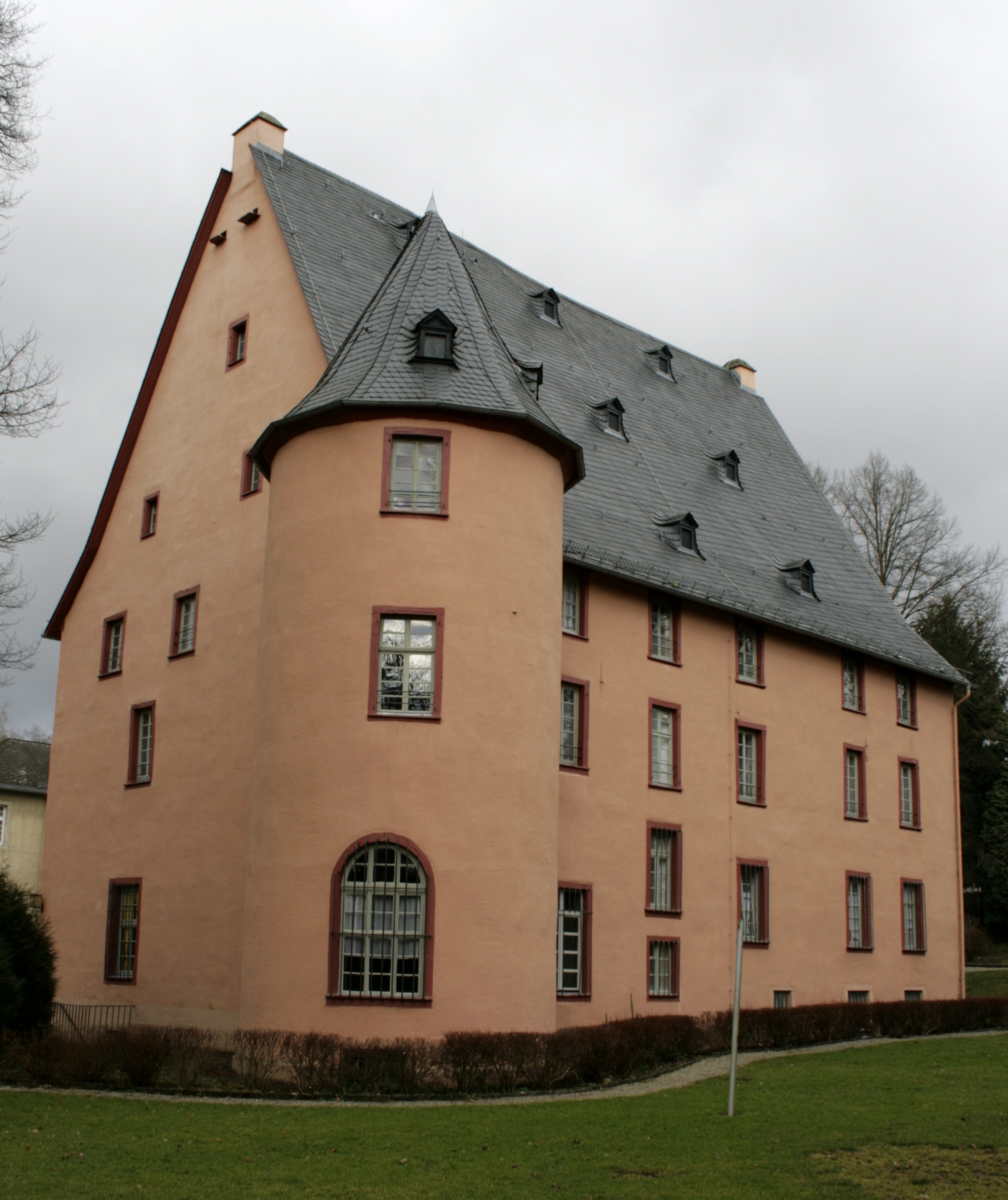 Rückseite der Burg Waldmannshausen in Elbgrund, Deutschland